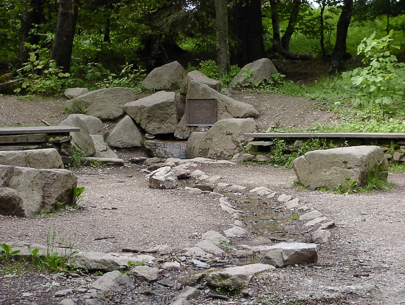 Lennequelle